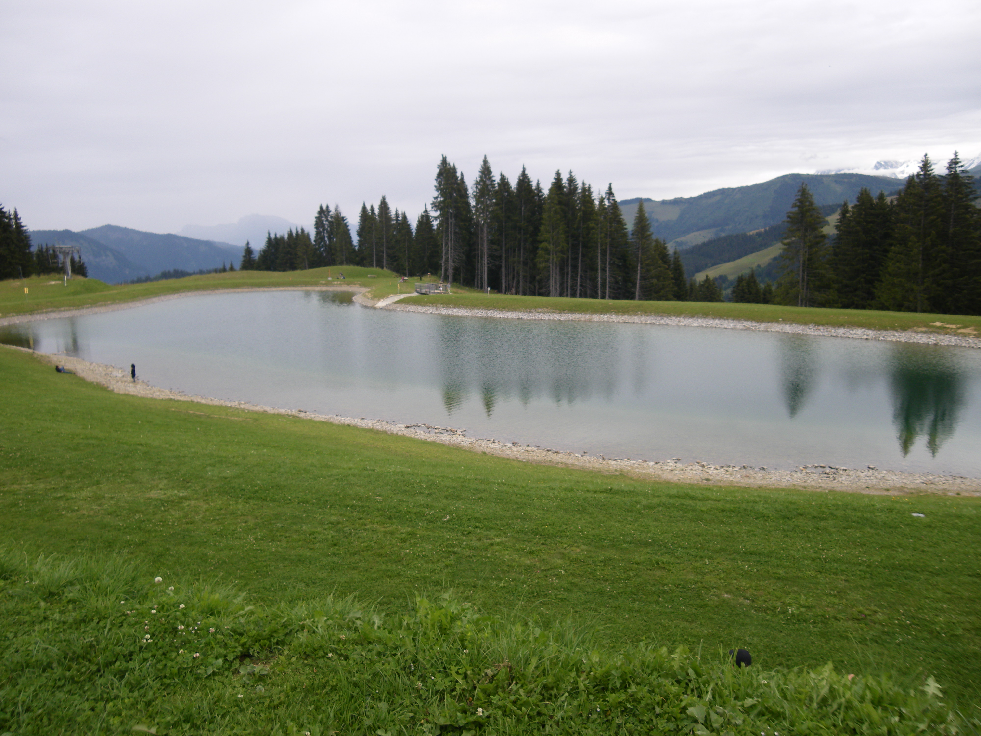 lac du mont lachat